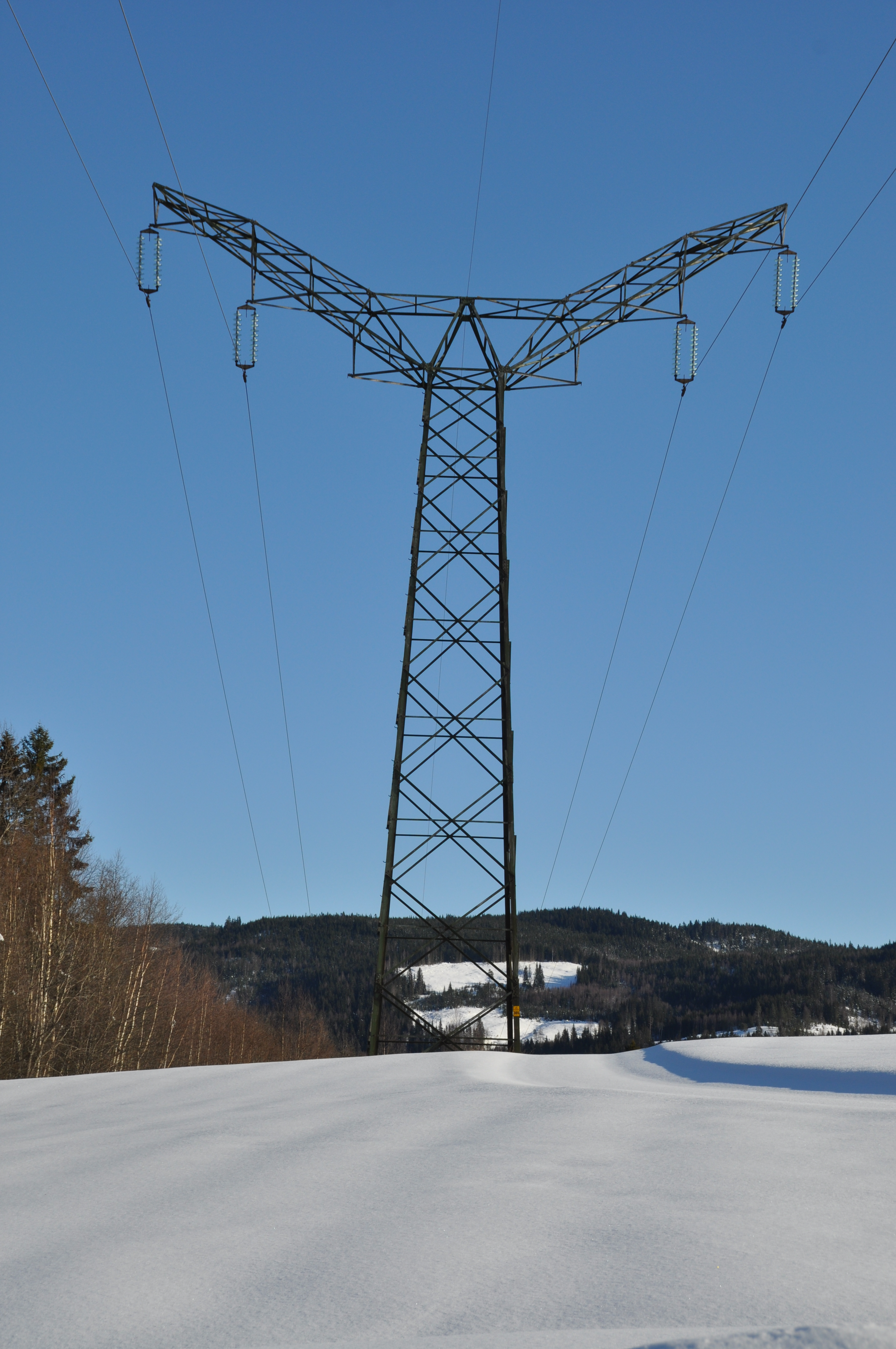 132 kV kraftledningen mellom Nore kraftverk i Numedalen og Smestad transformatorstasjon i Oslo, med sine karakteristiske og unike ”englemaster”. Ledningen ble idriftsatt i 1928, og var et pionerarbeid innen dimensjoner, lengde, spenningsnivå og ledningsbygging i vanskelig terreng og klima. Dato: 02.03.2010